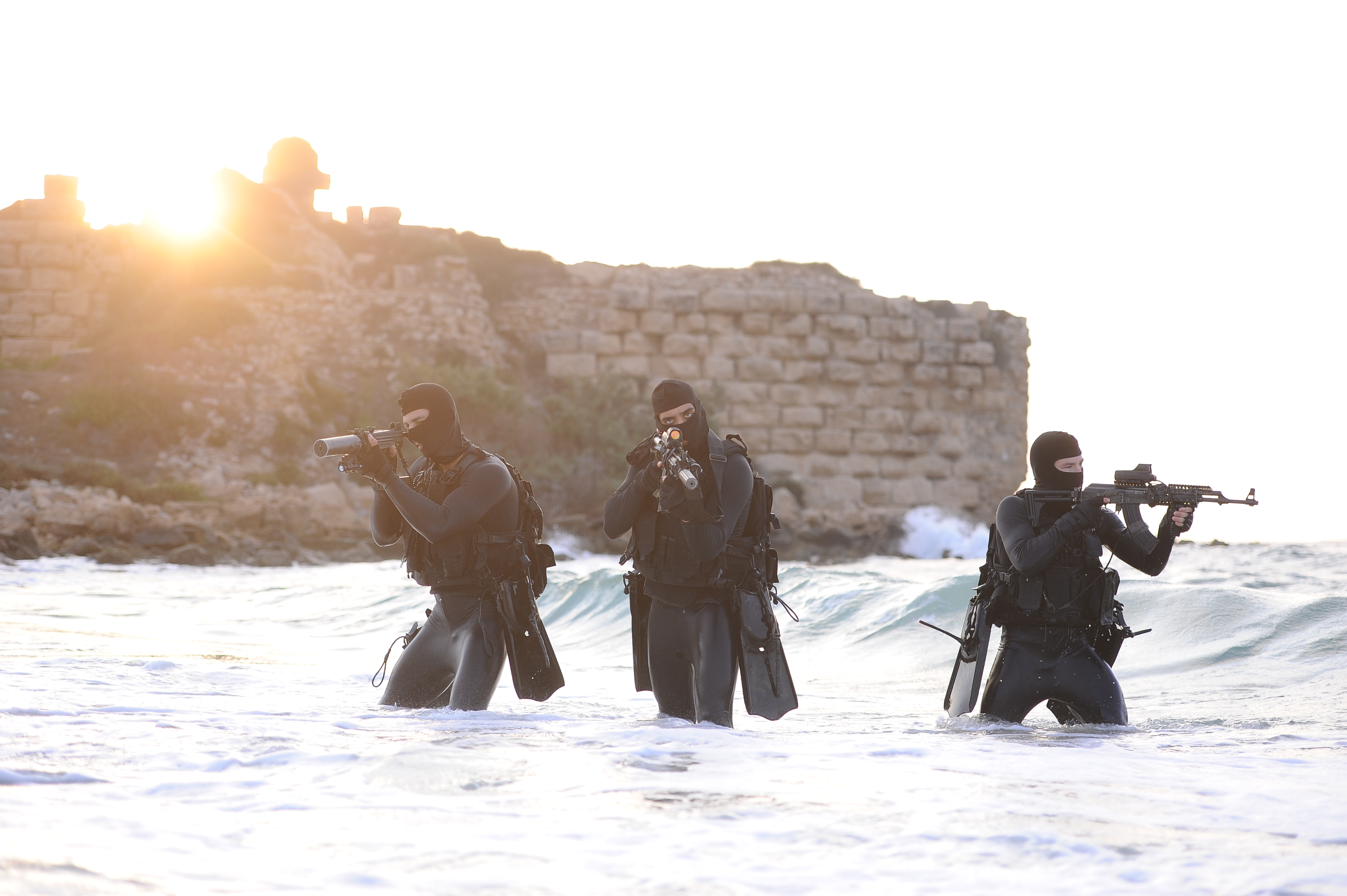 לוחמי שייטת 13 באימון